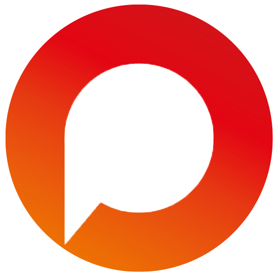 Логотип чемпионата по чтению вслух "Открой Рот"